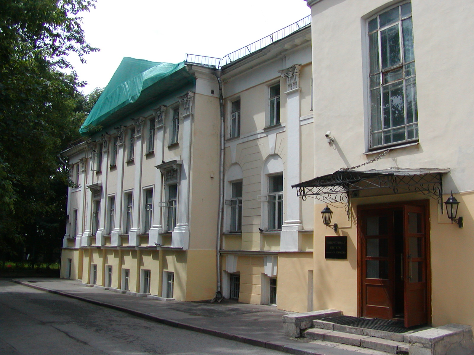 Главное здание Литературного института имени Горького (дом, где родился Герцен).